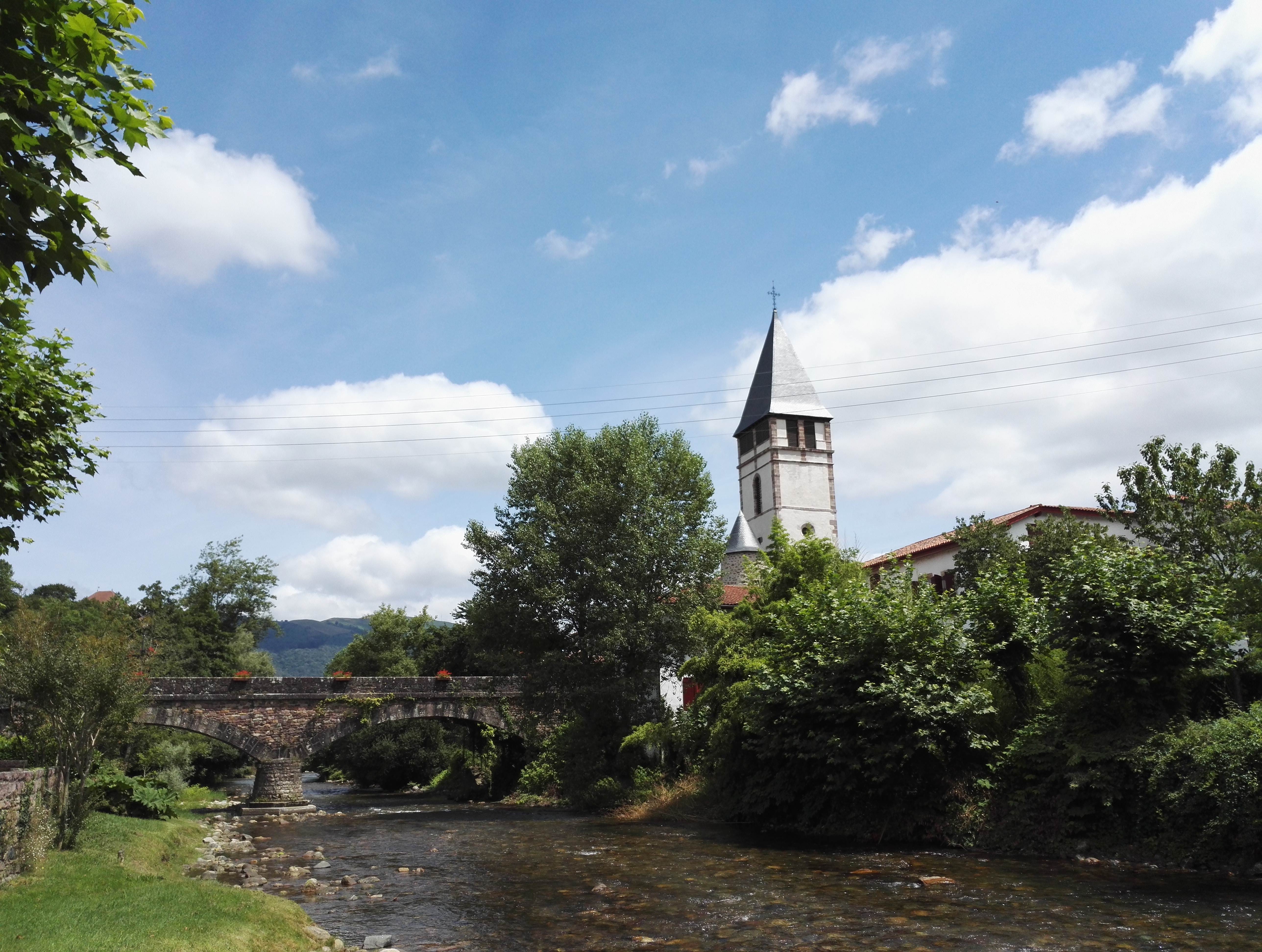 Depuis la rive de la Nive des Aldudes, vu du pont romain de l'église et de l'église St-Étienne.